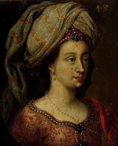 Détail d'un portrait de Elisabeth d'Autriche et de son époux. Musée des Offices, Florence (Inv. 1890, 636)